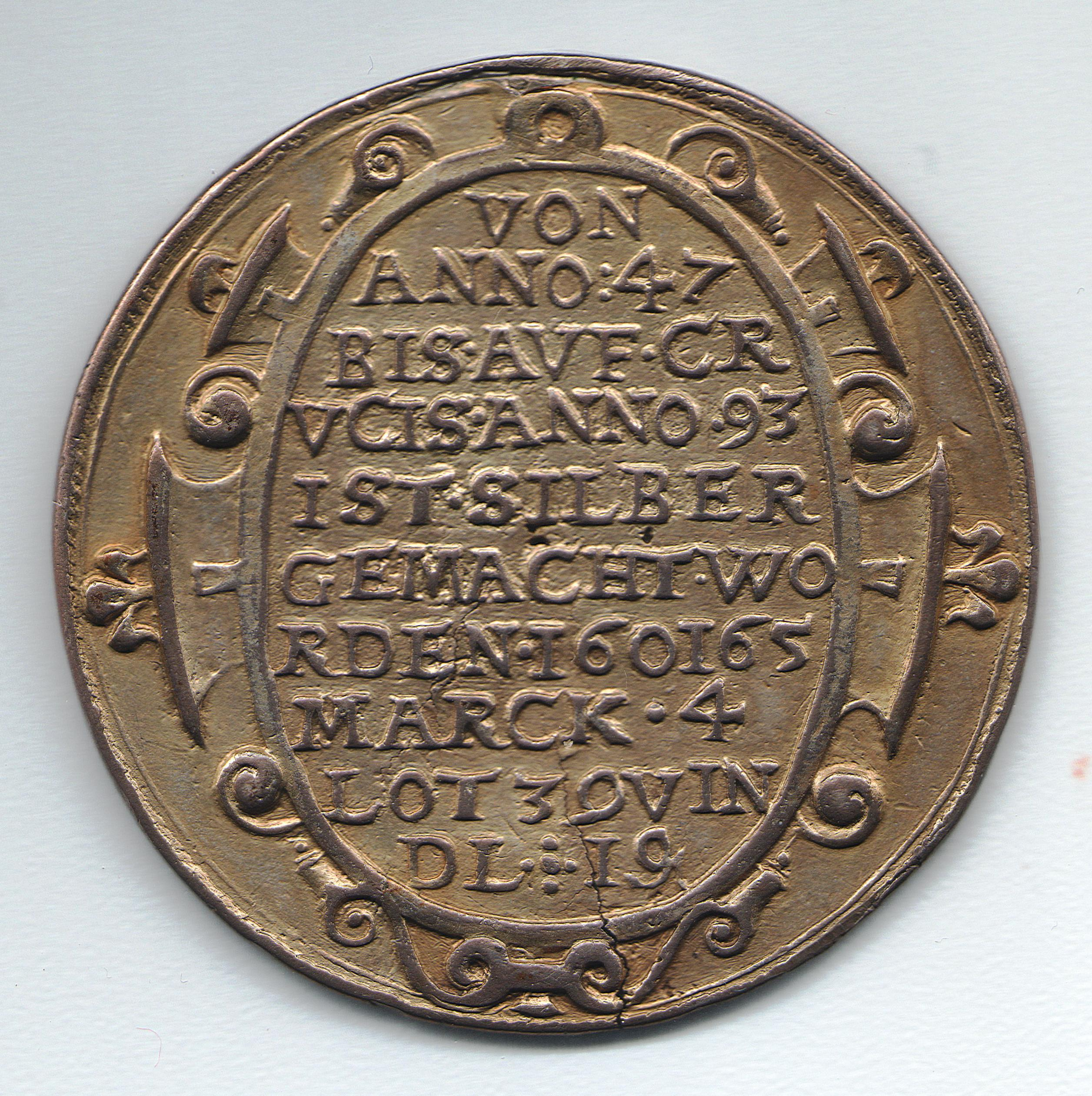 Rudolfov výtěžková medaile 1593 revers